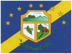 Bandera del distrito de Arraiján, Panamá